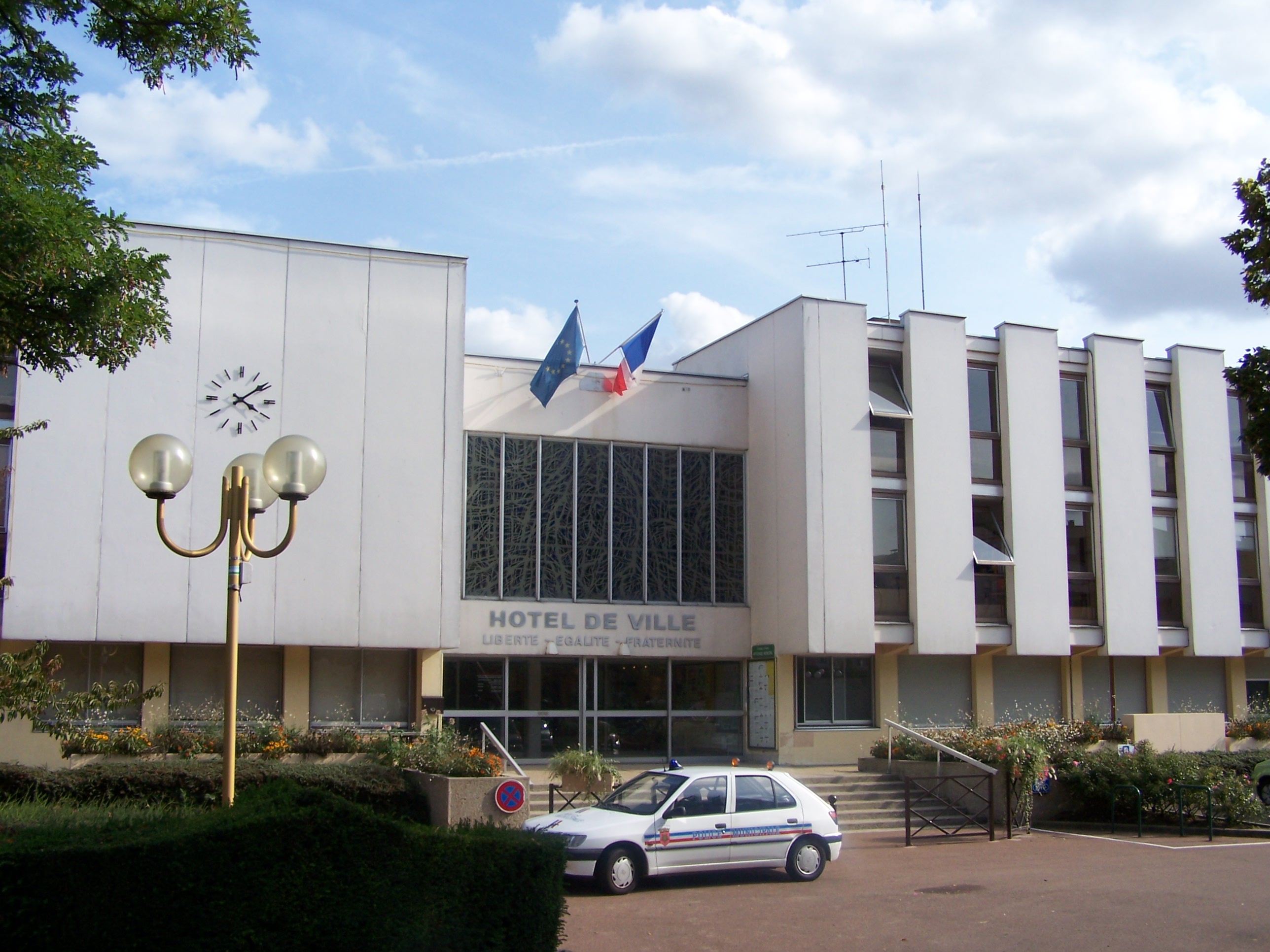 Mairie de Fontenay-le Fleury (Yvelines, France)